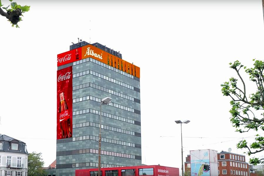 Dette er et billede af Bynes Højhus i Odense C, Fisketorvet TBT